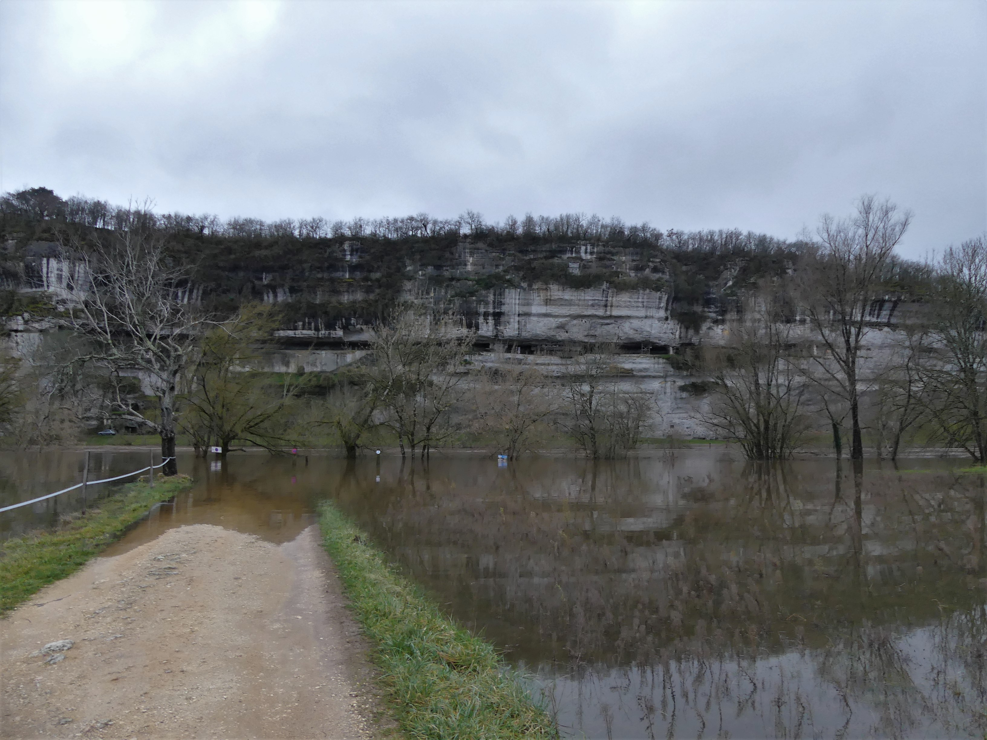 La Vézère en crue face à la Roque Saint-Christophe, Peyzac-le-Moustier, Dordogne, France.